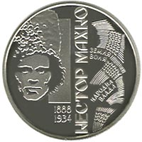 Нестор Махно реверс: Нестор Махно реверс